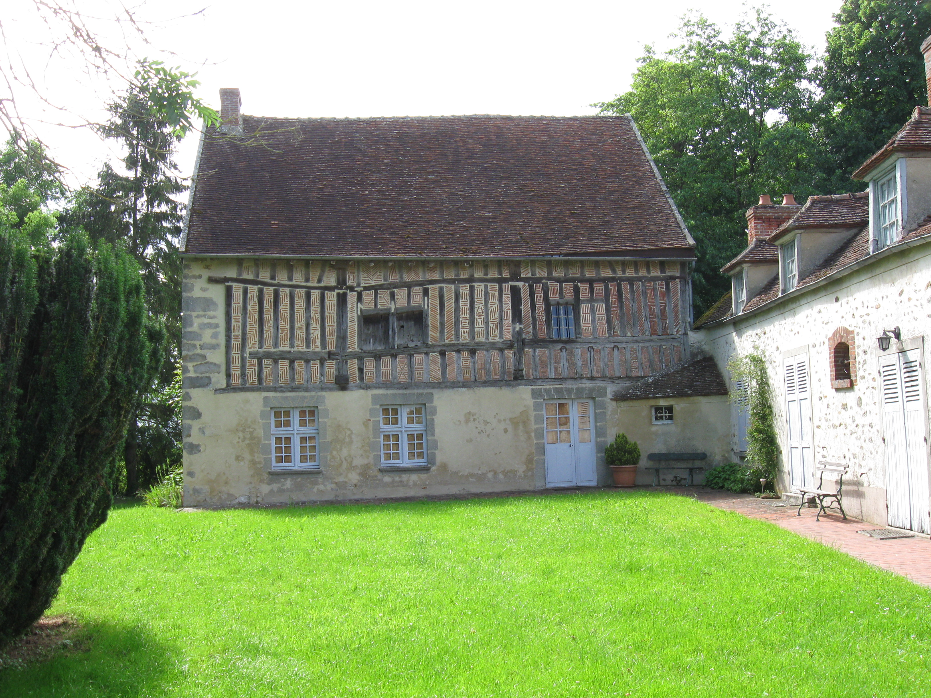 Maison dite « de La Fosse » à Chartronges. (Seine-et-Marne, région Île-de-France).